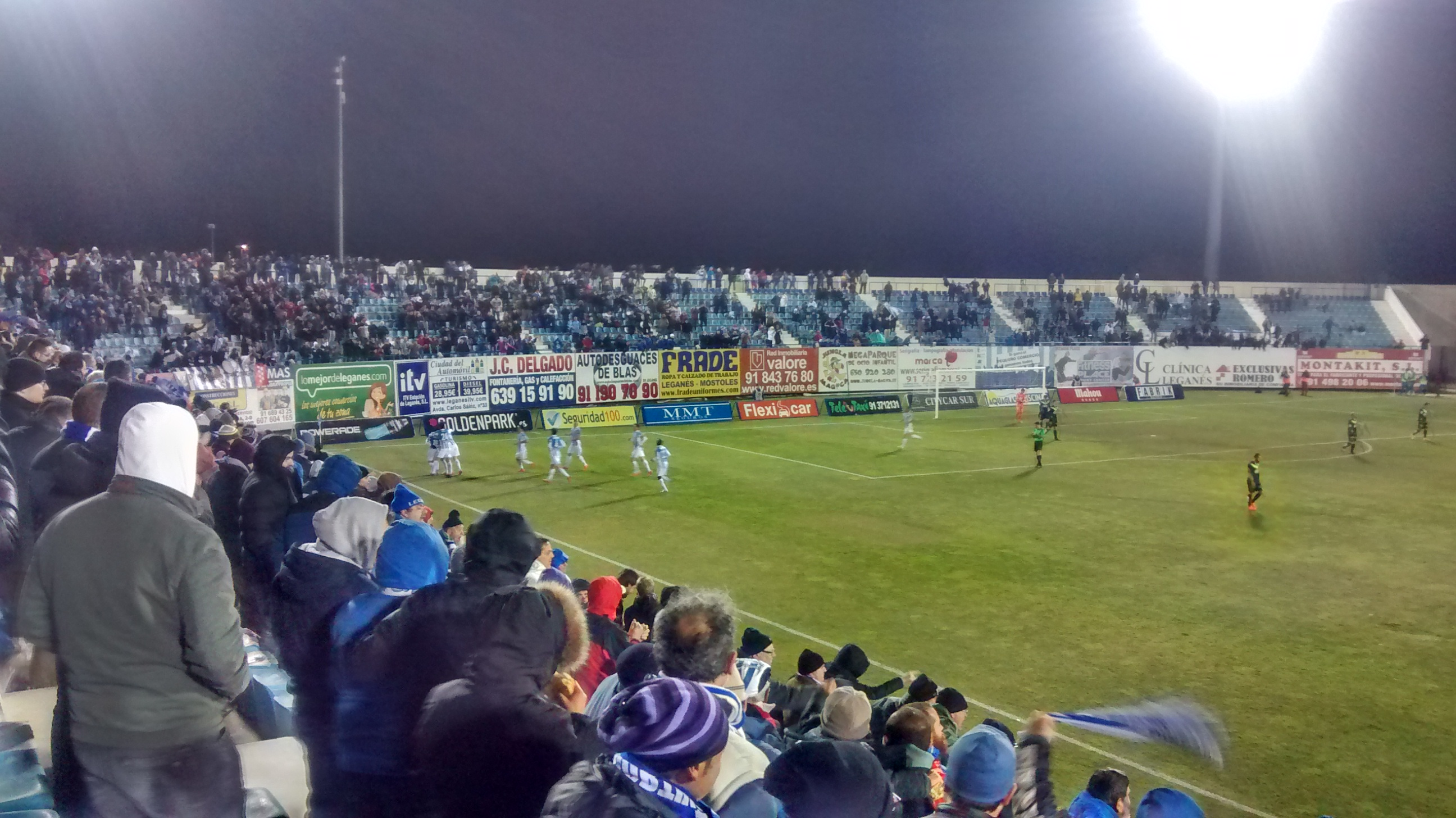 Paritdo Leganés 2-0 Llagostera, temporada 2014/15 de la Segunda División